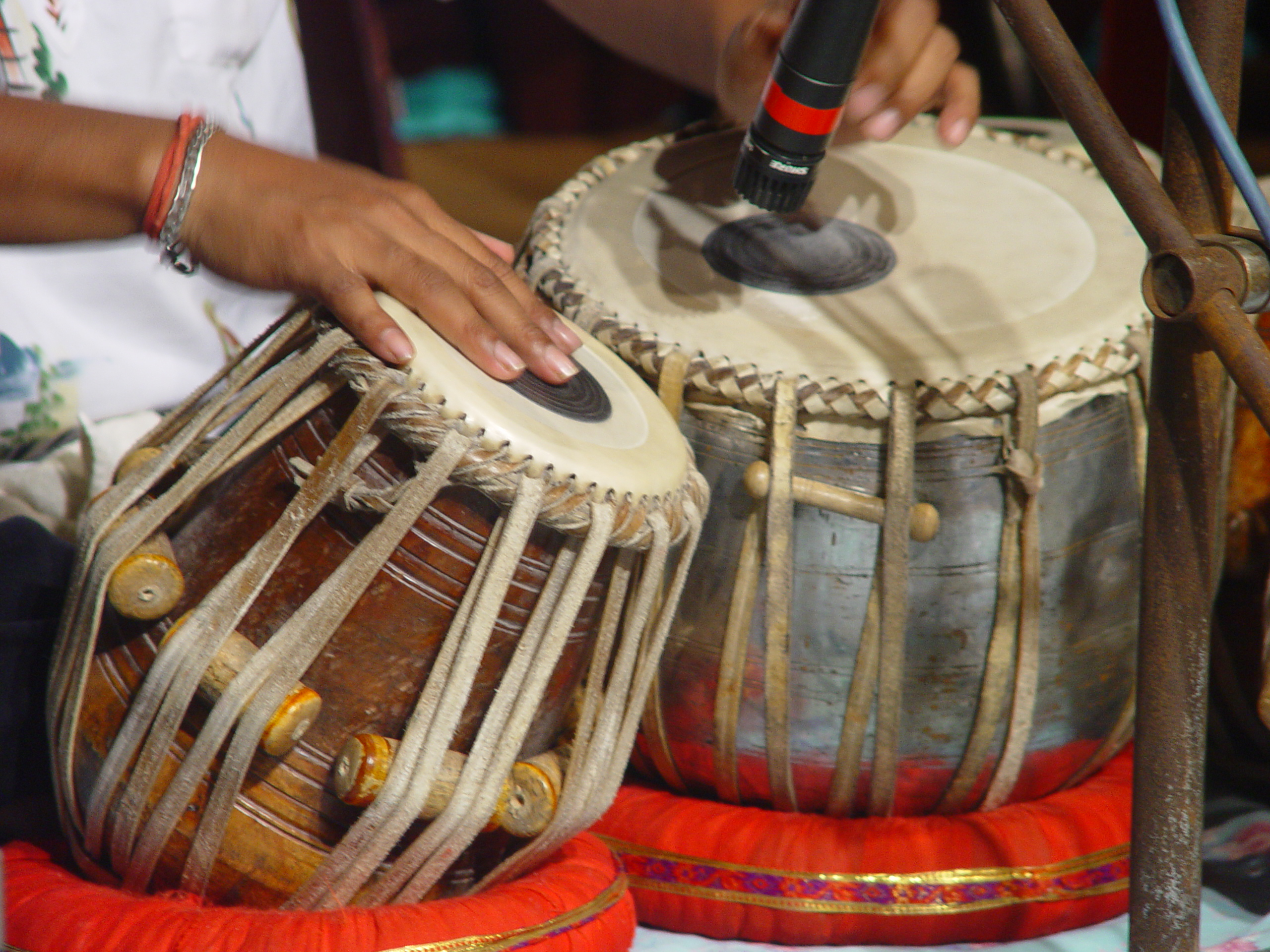 Tabla played at Kolkata.